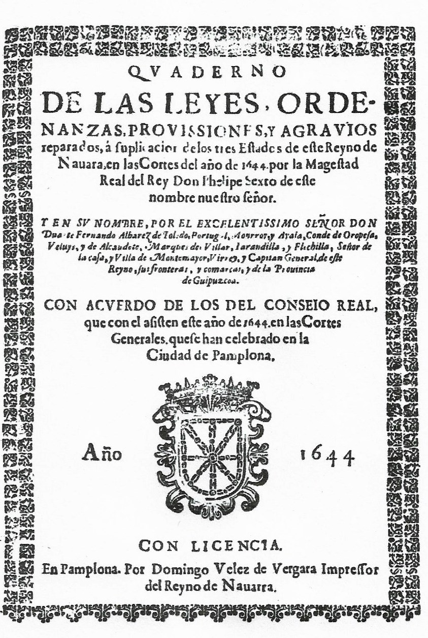 Cuaderno de Cortes de Navarra, 1644. Pamplona, Domingo Velez de Vergara, 1644